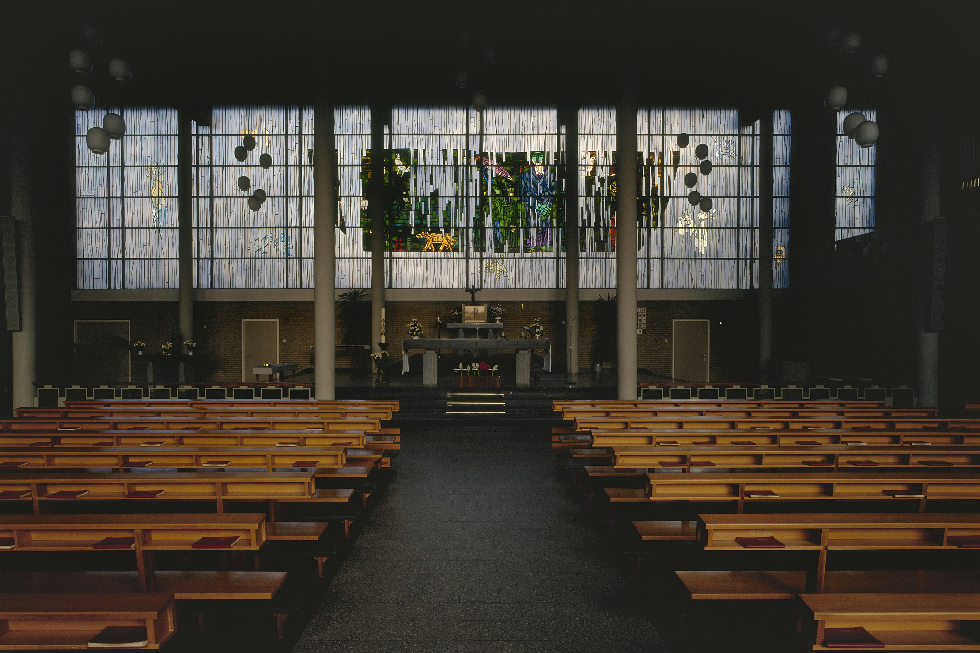 Sint Jozefkerk: Interieur, overzicht naar het oosten met glas-in-loodraam (opmerking: Gefotografeerd voor Glas in lood in Nederland 1817-1968)